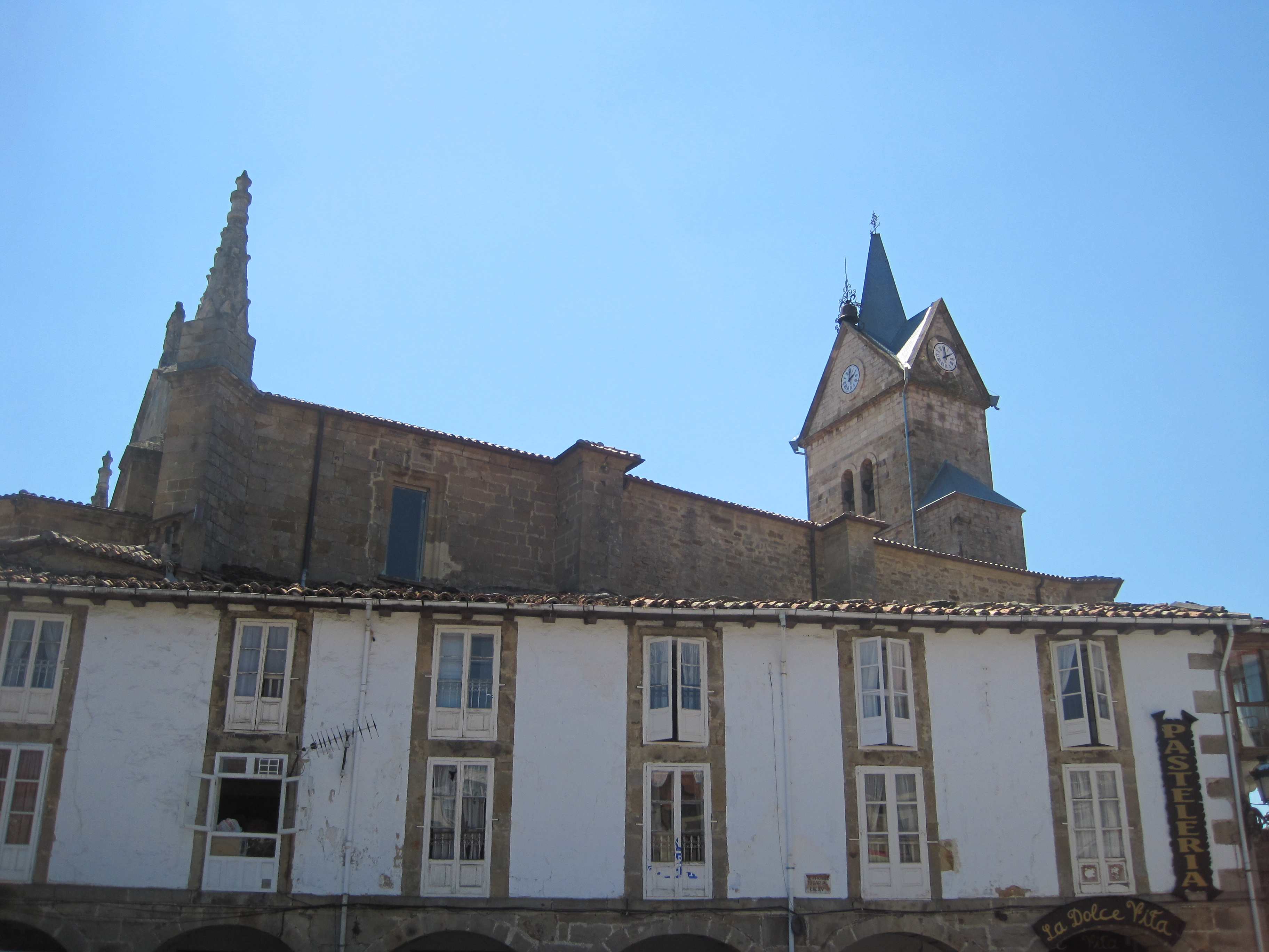 Vista lateral de la Iglesia de Santa Cecilia de Espinosa.